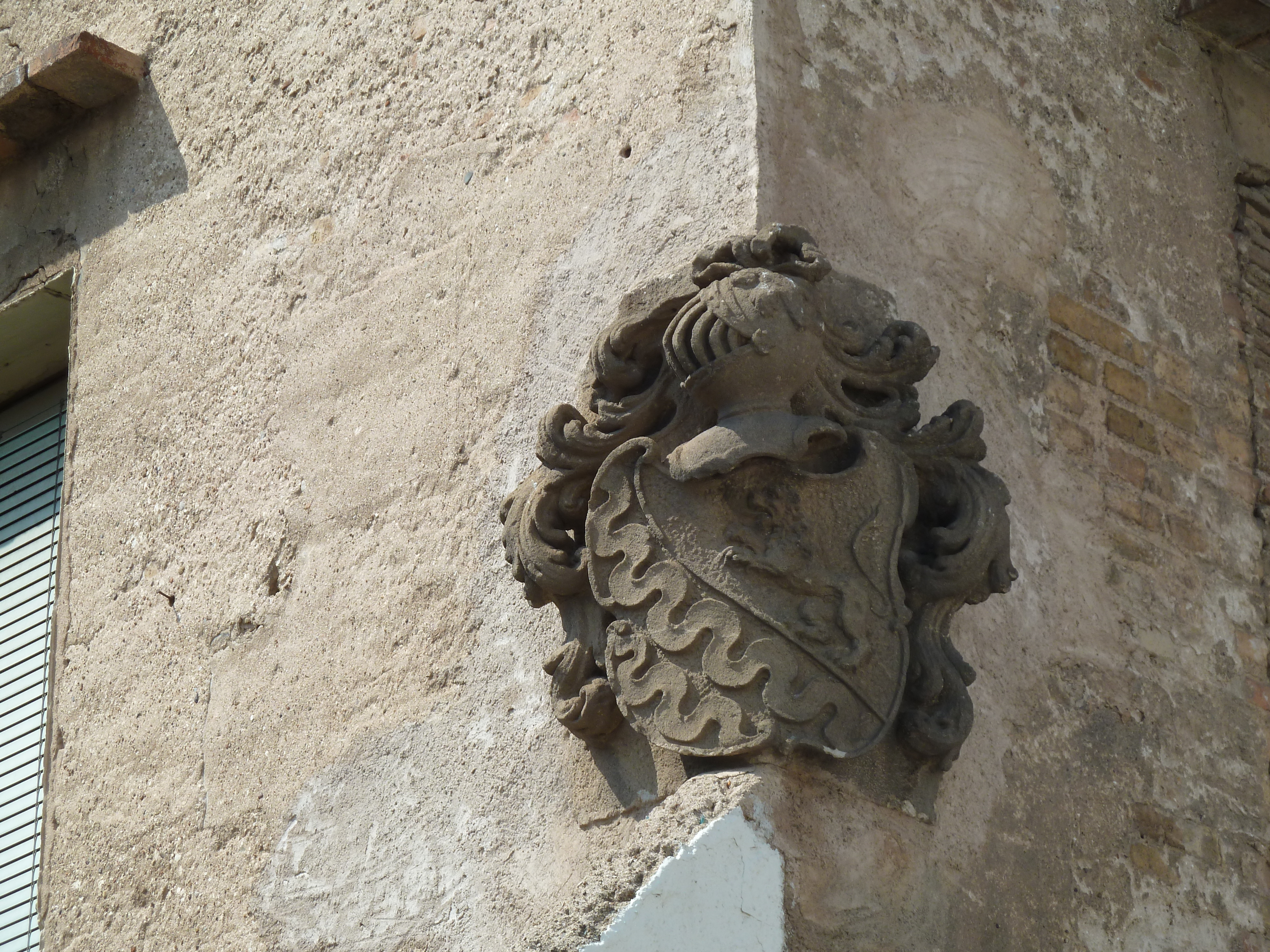 Sant Adrià de Besòs